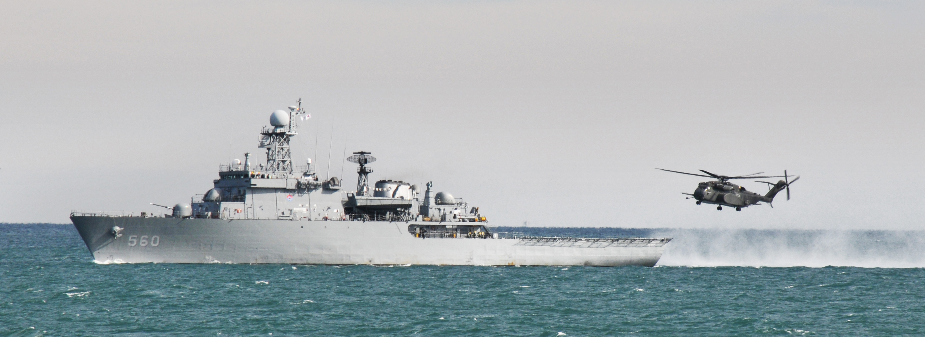 한미 해군은 지난 12일부터 경남 거제도 인근 해상에서 연합 기뢰전 훈련을 실시하였다. 본훈련을 통해 임무수행 능력을 높이고 혈맹관계를 공고히 다지는 성과를 거뒀다 촬영자 : 남기태